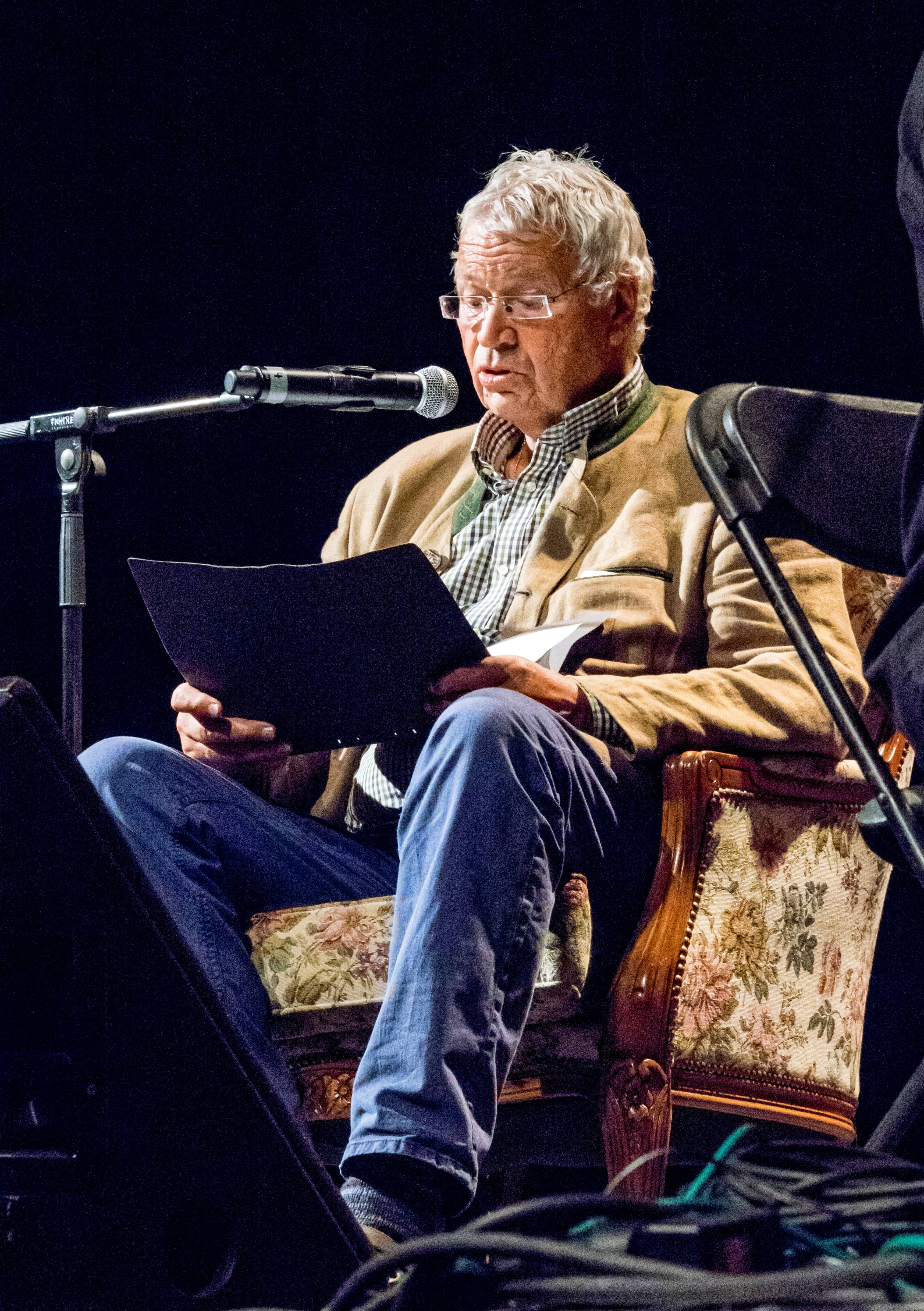 Bilder vom ZMF 2015 Die Gala am 12. 07. 2015